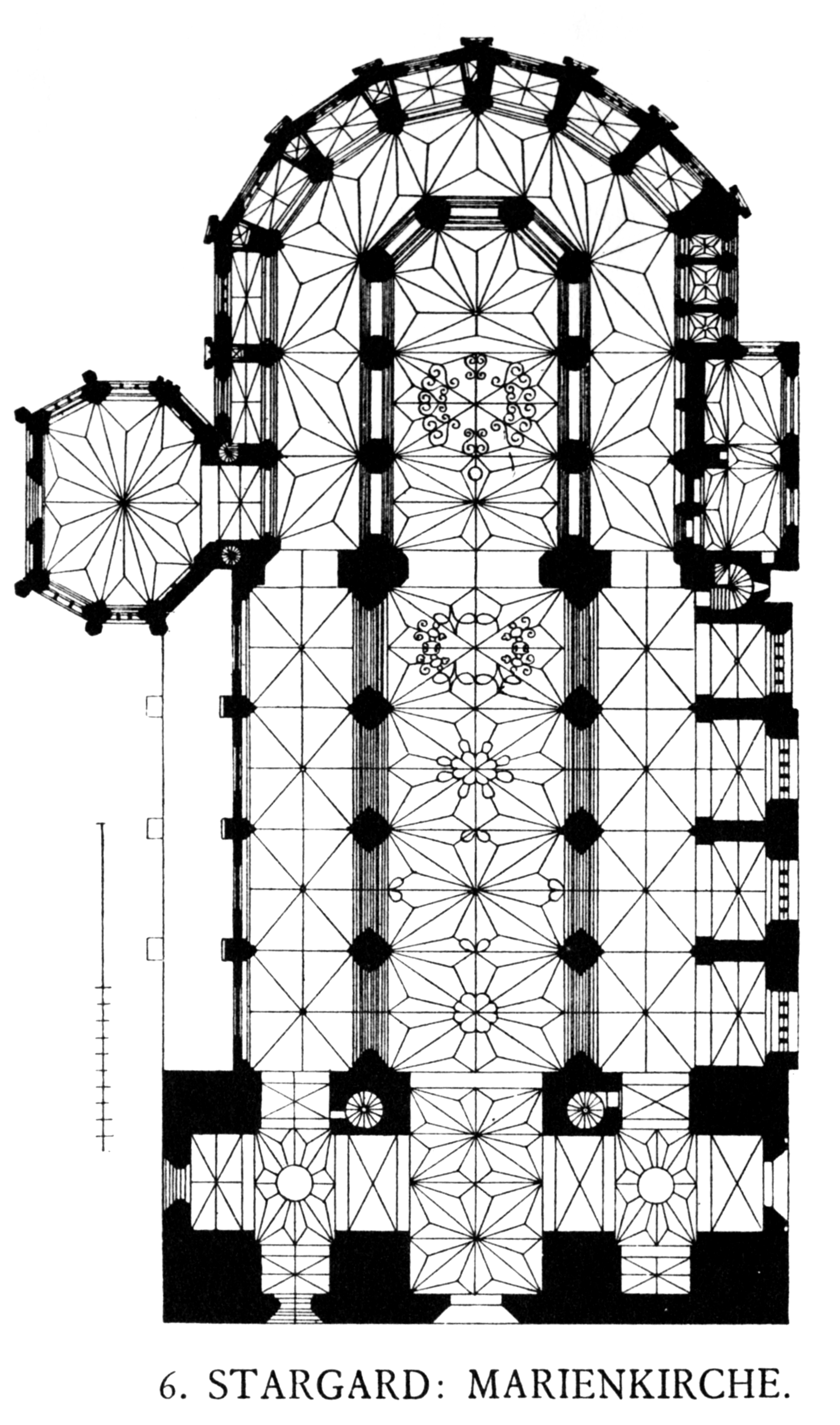 Stargard, St. Marien